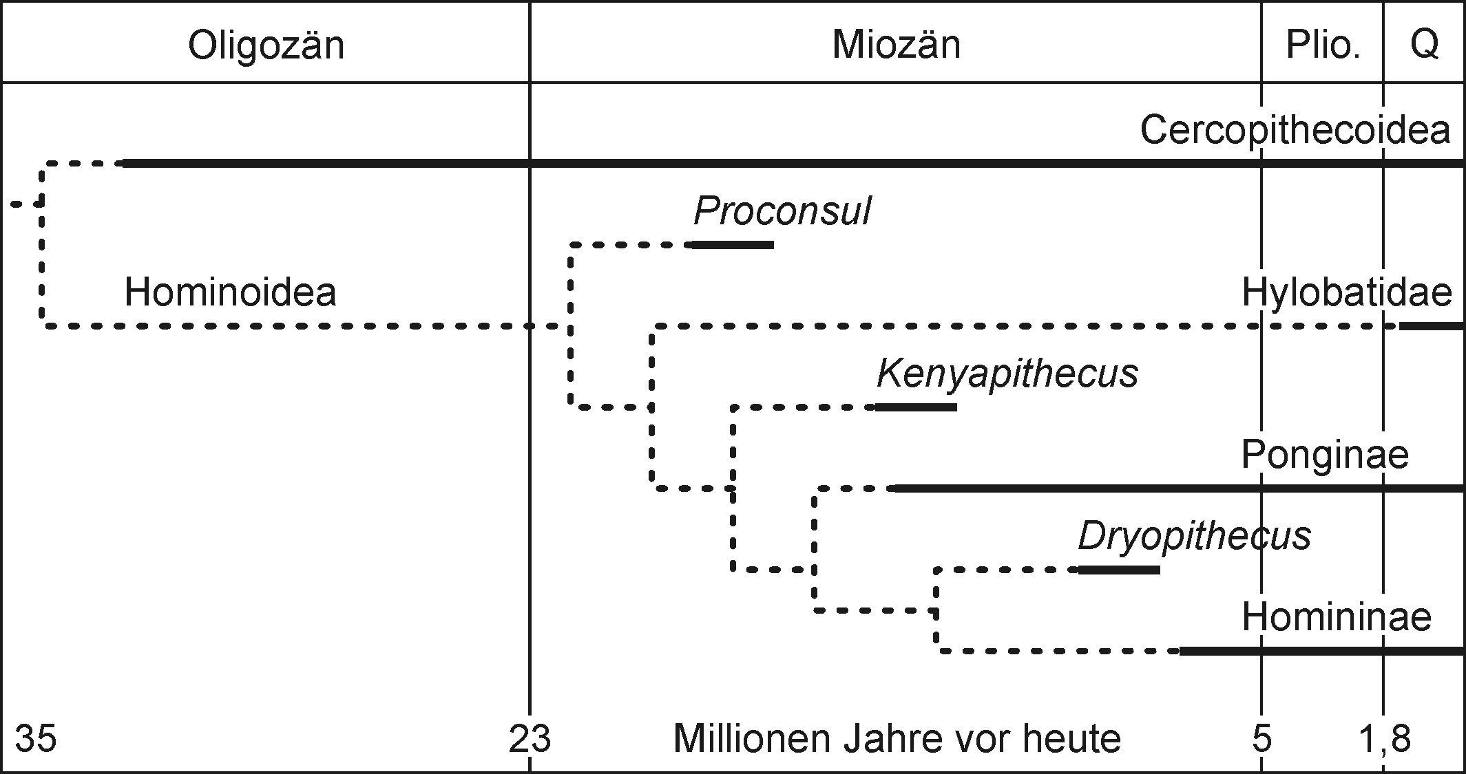 Stratocladogramm der Catarrhini. Anmerkung:stellt Zusammenhänge aus den beiden Schemata in Box 11.3, S. 373 vereinfacht dar